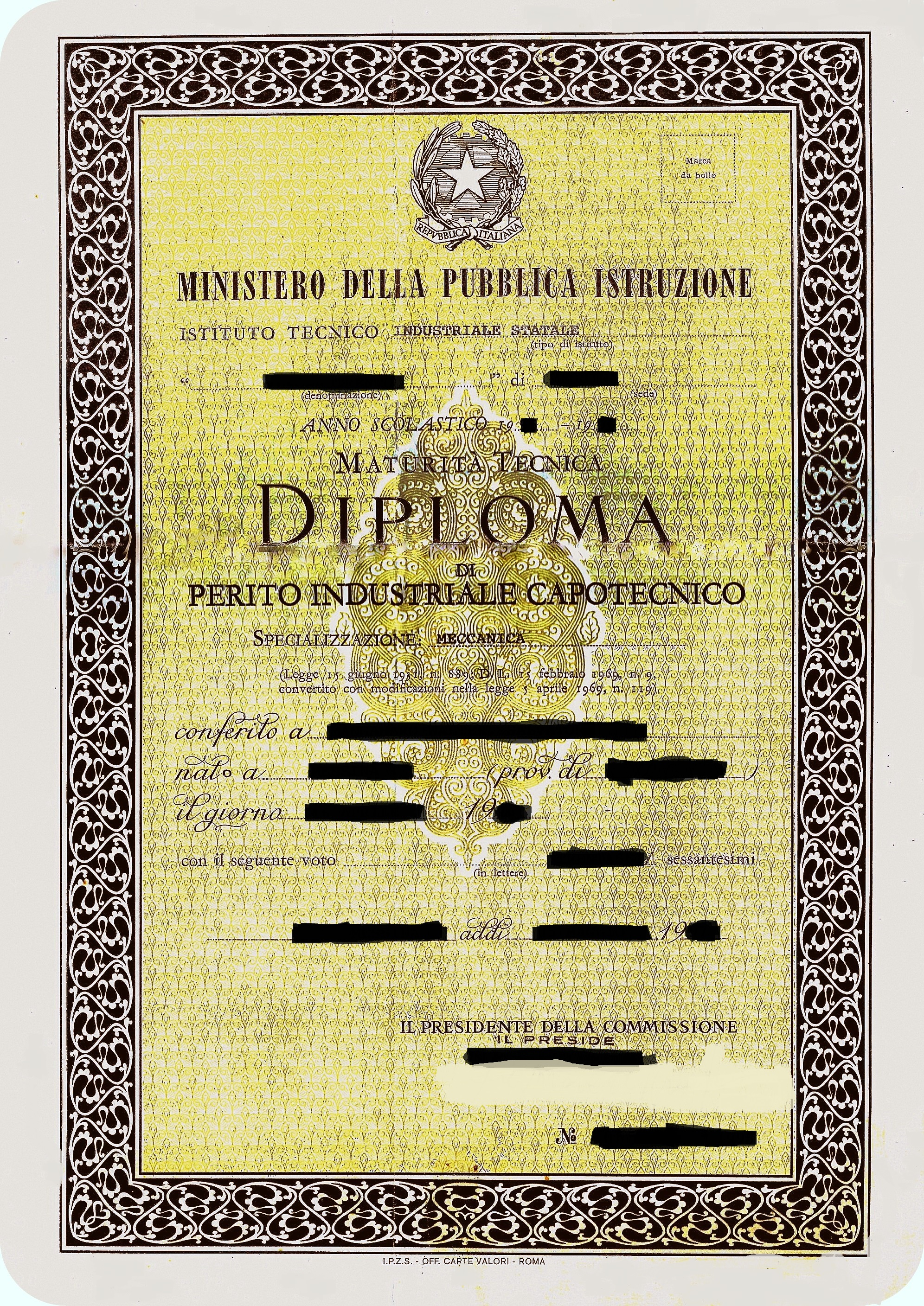 Diploma di Scuola Superiore ITIS con Specializzazione in Meccanica